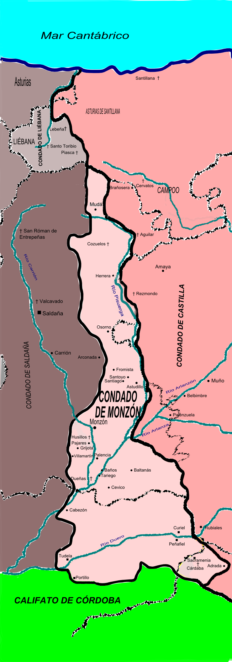 Condado de Monzón. Signos: ● Población, ■ Fortaleza, † Centro religioso